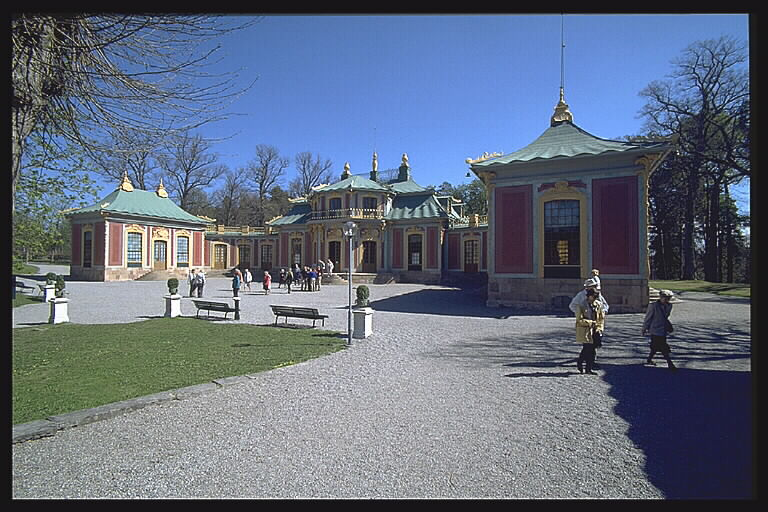 Kina slott. Motiv: Drottningholm Nyckelord: Byggnadsminnen:Statl, Världsarv Kategori: SlottKina slott.